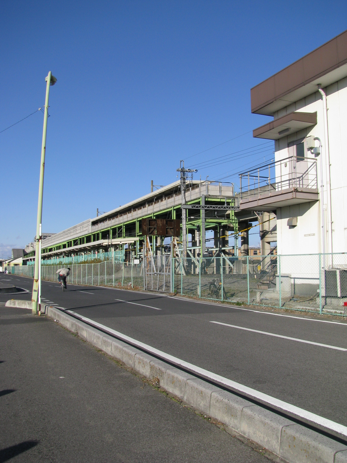 JR東鷲宮駅